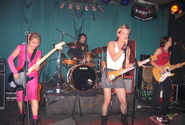 AK4711 im Weinheimer Café Central, 27. Mai 2005